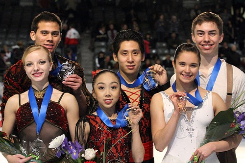 Подиум в парном катании на финале Гран-при среди юниоров 2011-2012. Слева на право: Кэтрин Бобак / Йэн Бехарри (2-е место), Суй Вэньцзин / Хань Цун (1-е место), Бритни Симпсон / Мэттью Блэкмер (3-е место)